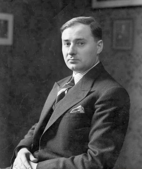 Pianist Bolesław Woytowicz